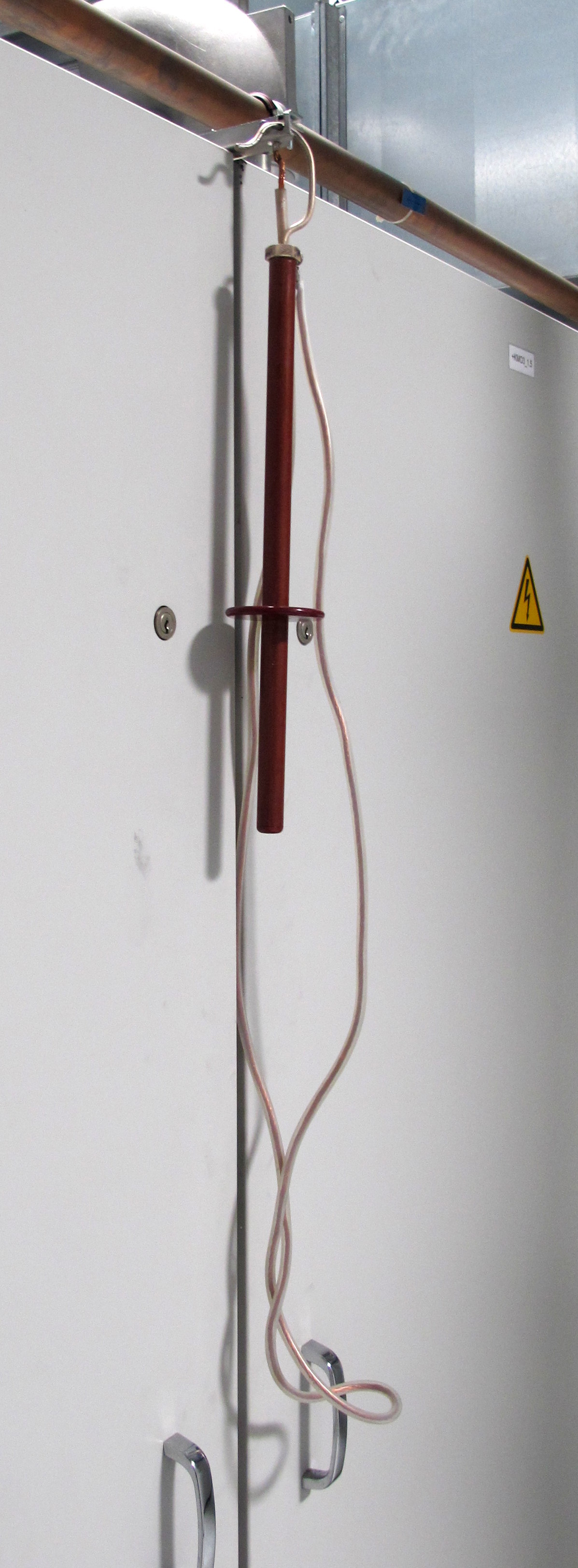 Erdungspeitsche